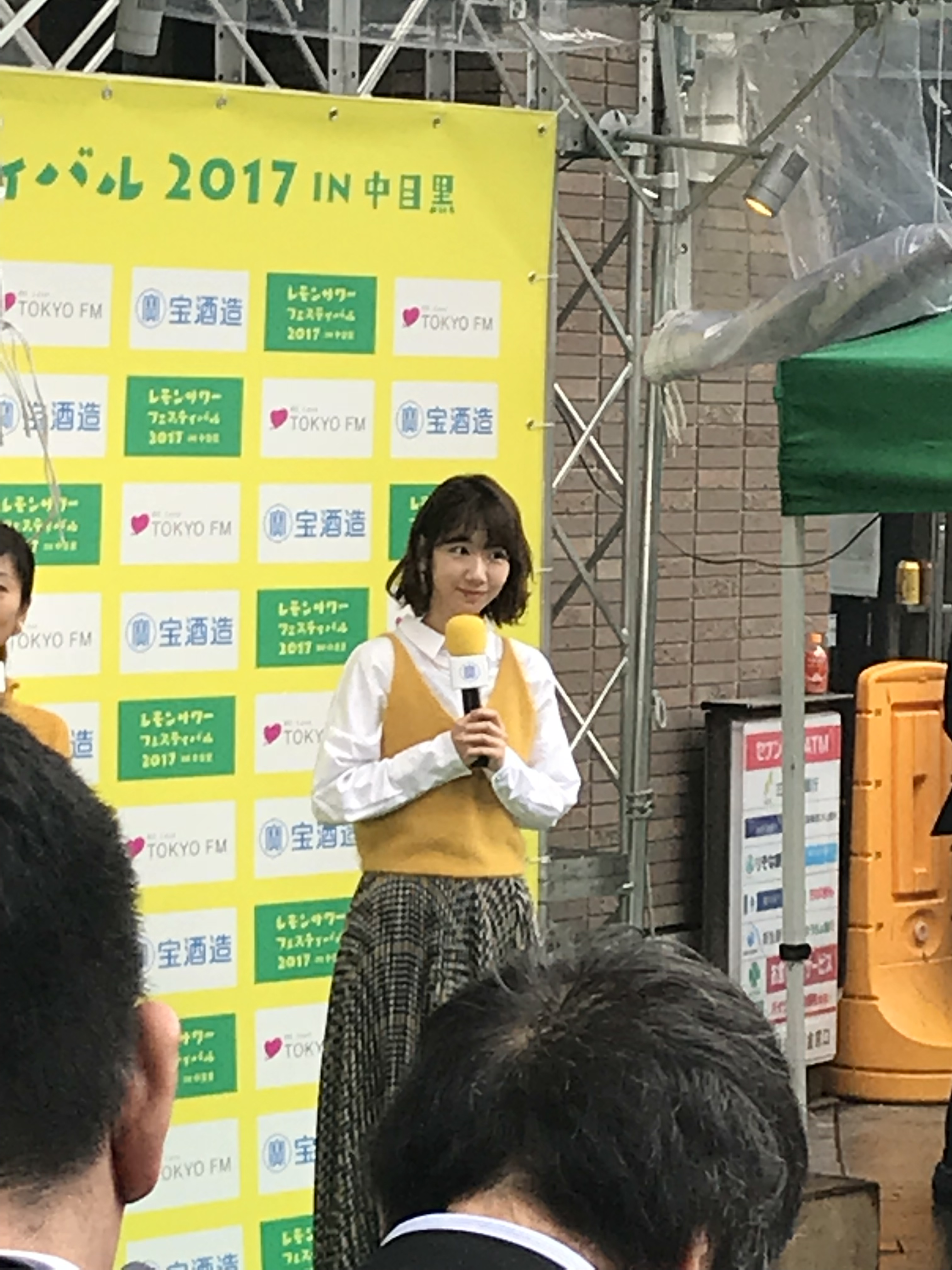 レモンサワーフェスティバル2017 in 中目黒 開会式にて